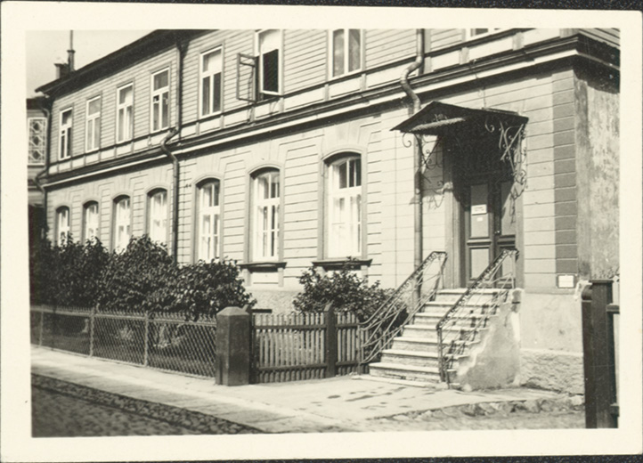 Tatari tänav 15